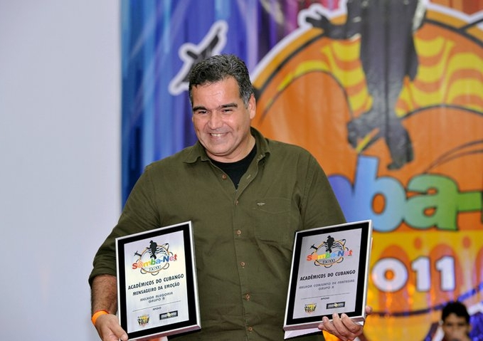 Entrega do Prêmio S@mba-net 2011. Foto: Ricardo Almeida.